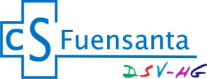 Logotipo del Centro de Salud Fuensanta, de Valencia (Spain)